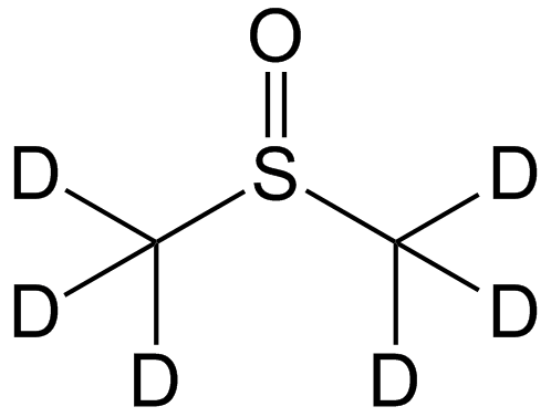 Gedeutereerd dimethylsulfoxide